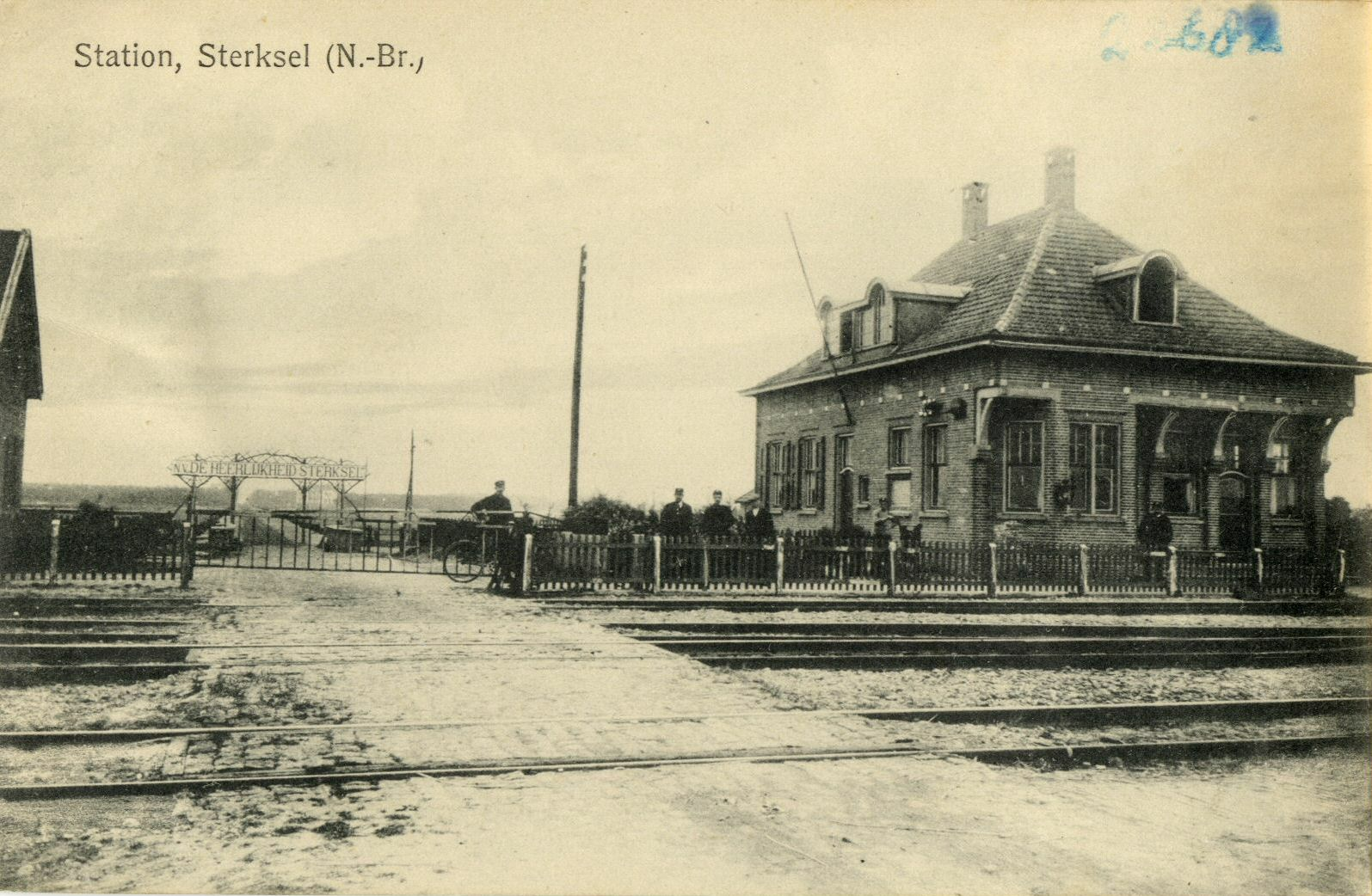 Gezicht op het S.S.-station Sterksel te Sterksel.